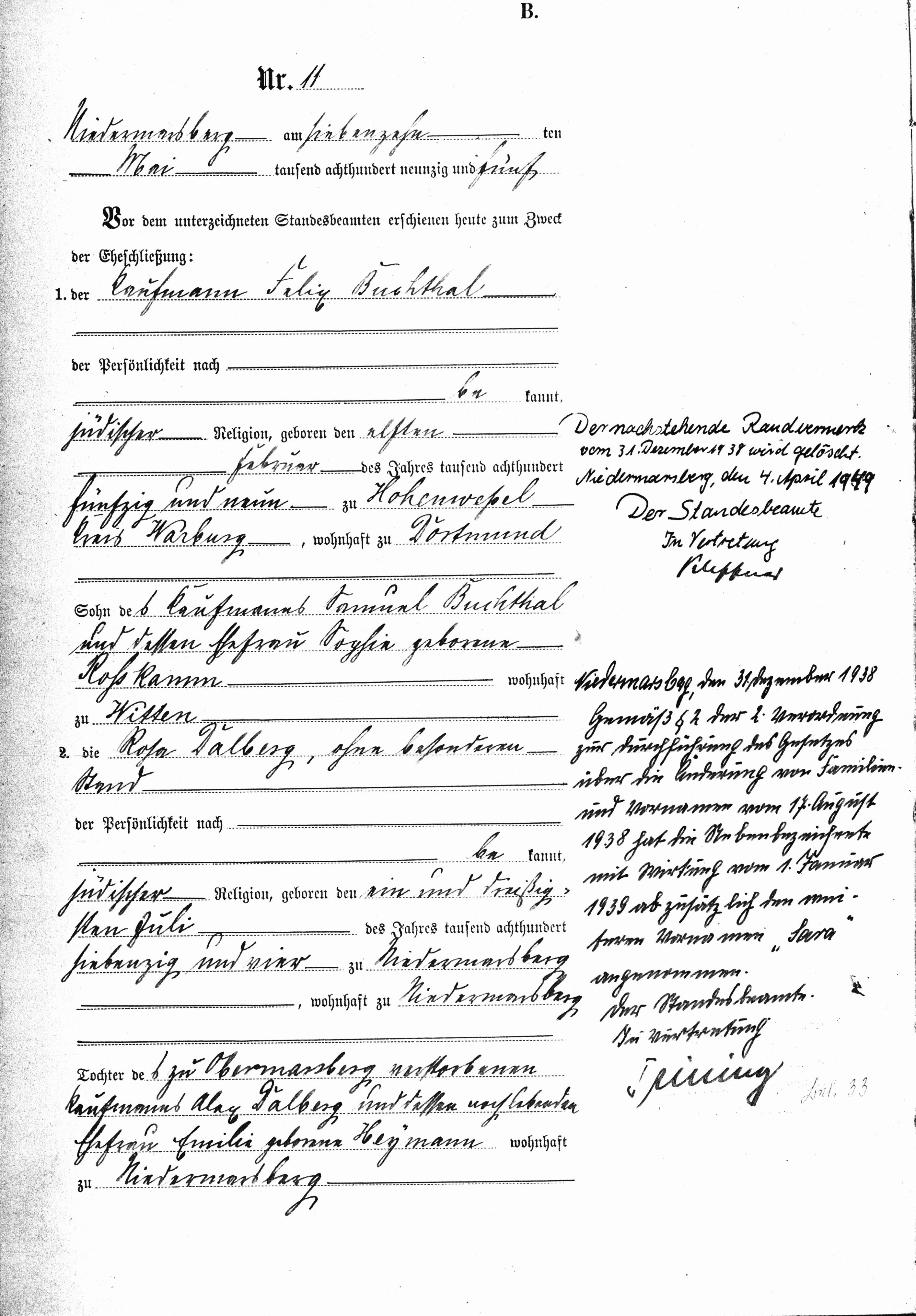 Heiratsurkunde des Standesamts Niedermarsberg zwischen Rosa und Felix Buchthal.